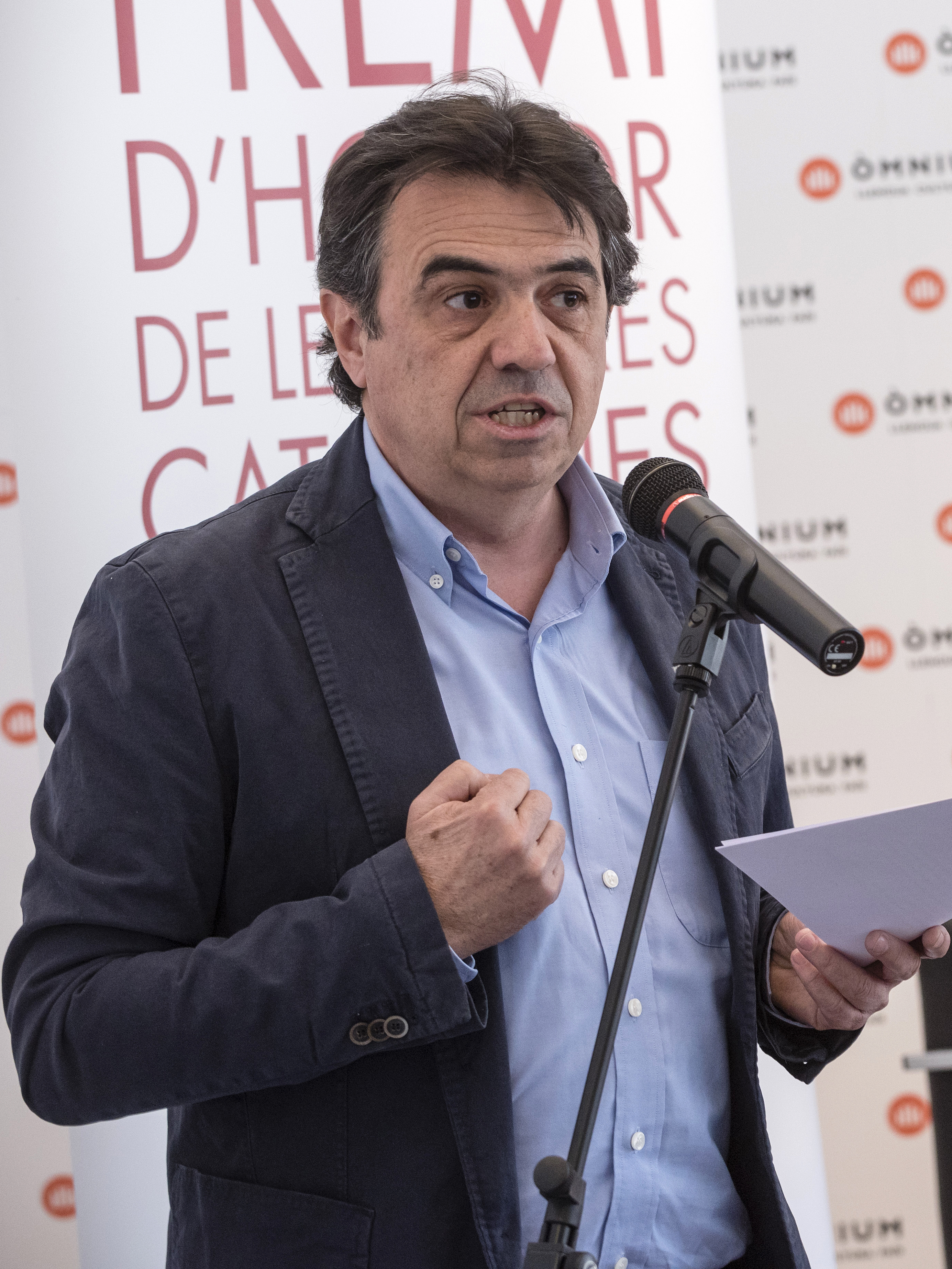 _DC67526